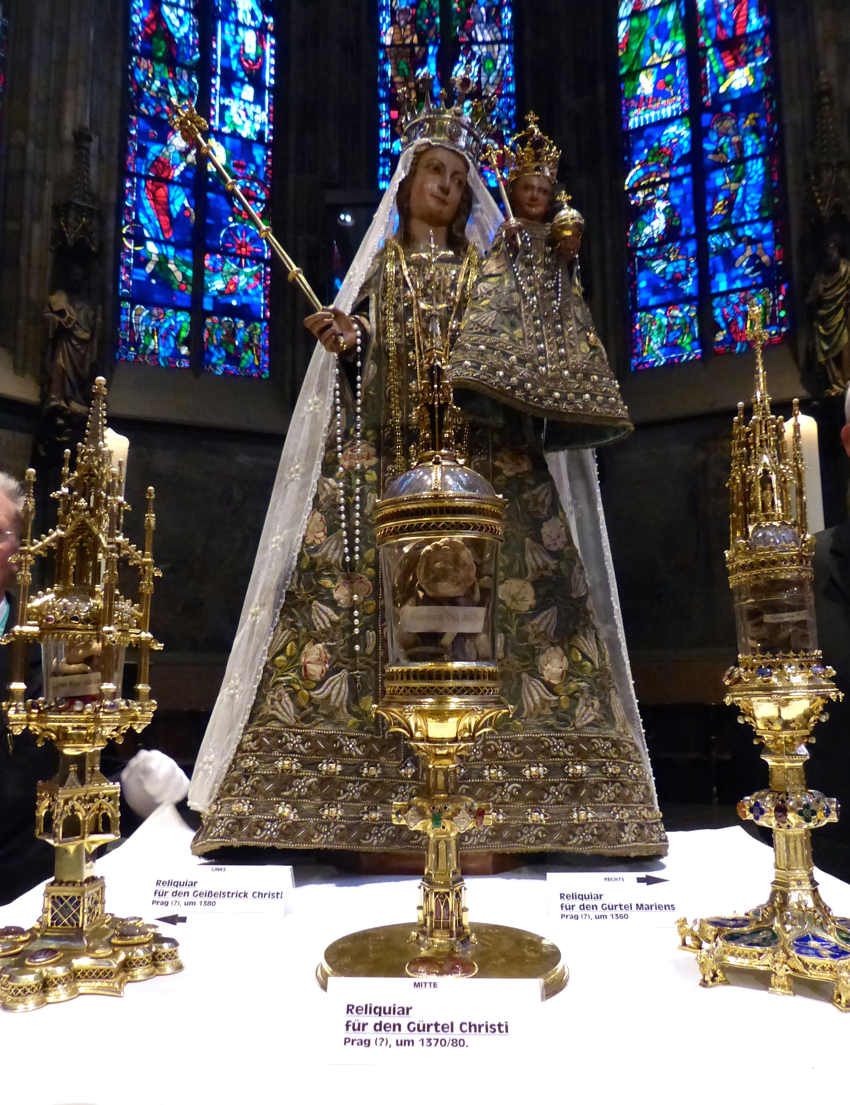 Aachener Dom: Madonna mit dem Kinde, Reliquien - ausgestellt während der Heiligtumsfahrt